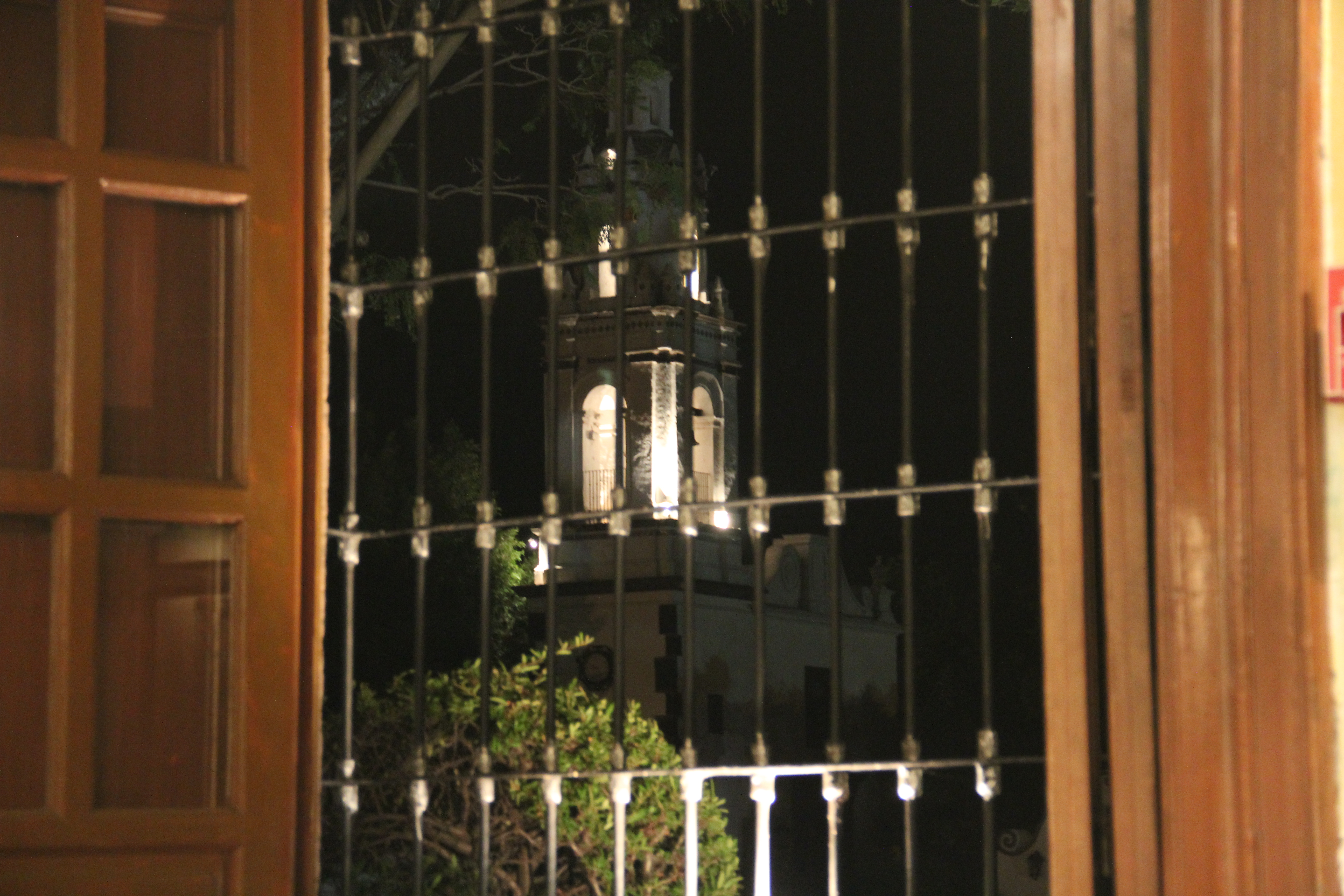 Capilla de Nochebuena de la Hacienda Galindo vista desde un ventanal de la Hacienda Galindo